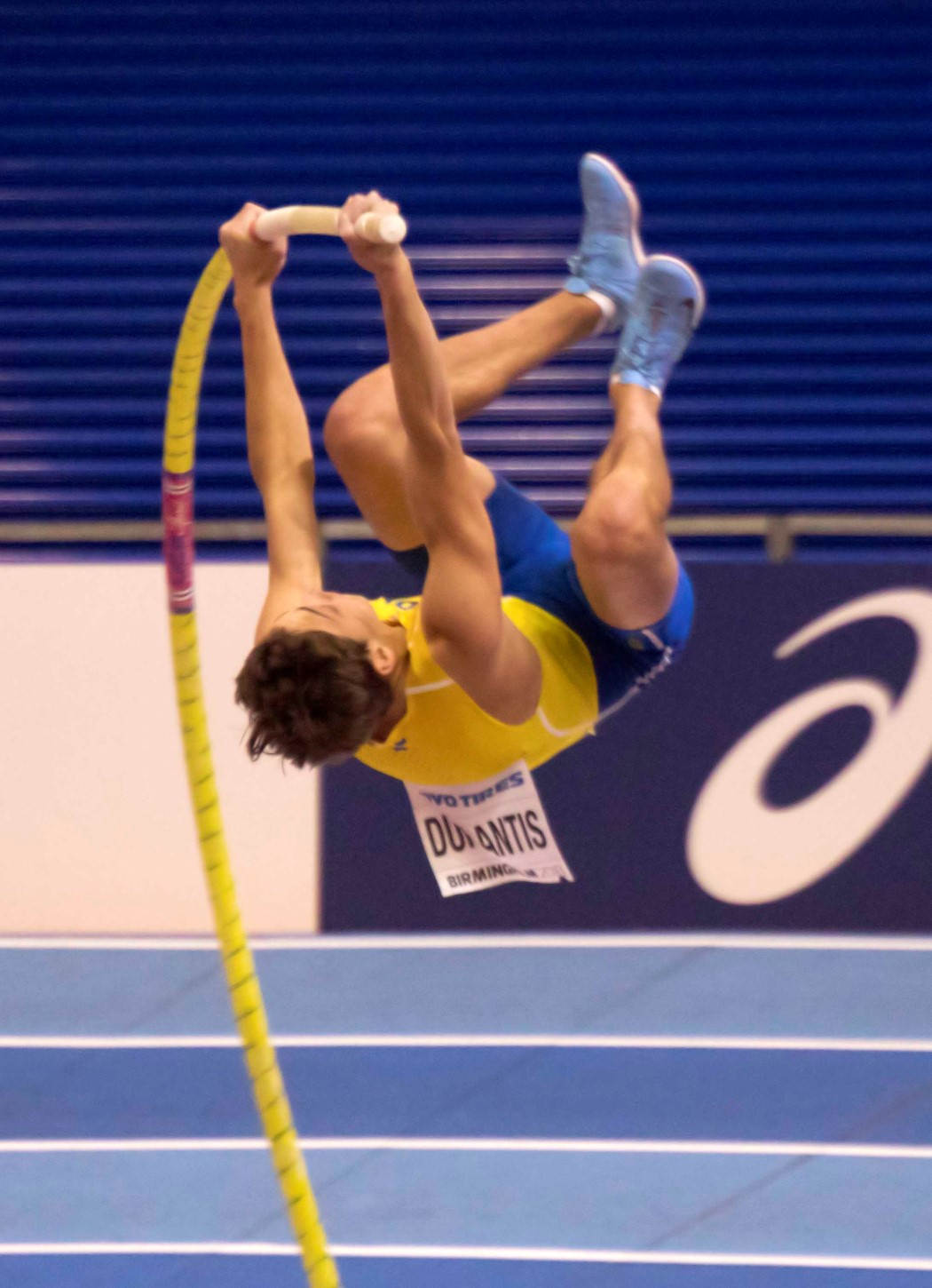 WK040289 polsstok duplantis